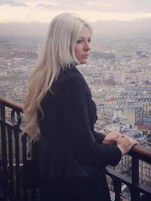 Cristina Boshoff